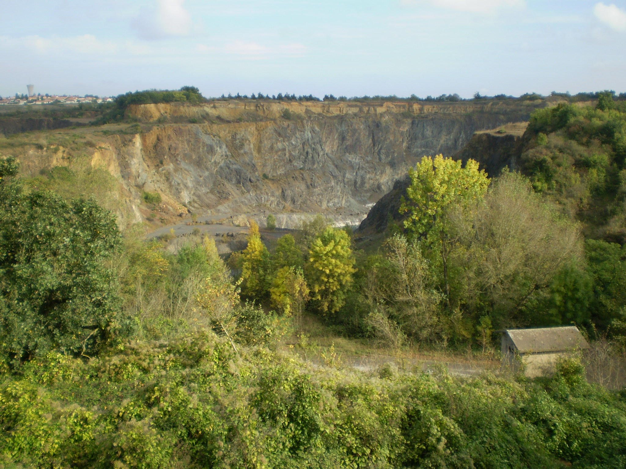 Ancienne carrière de Ligron à Sainte-Radegonde (Deux-Sèvres)